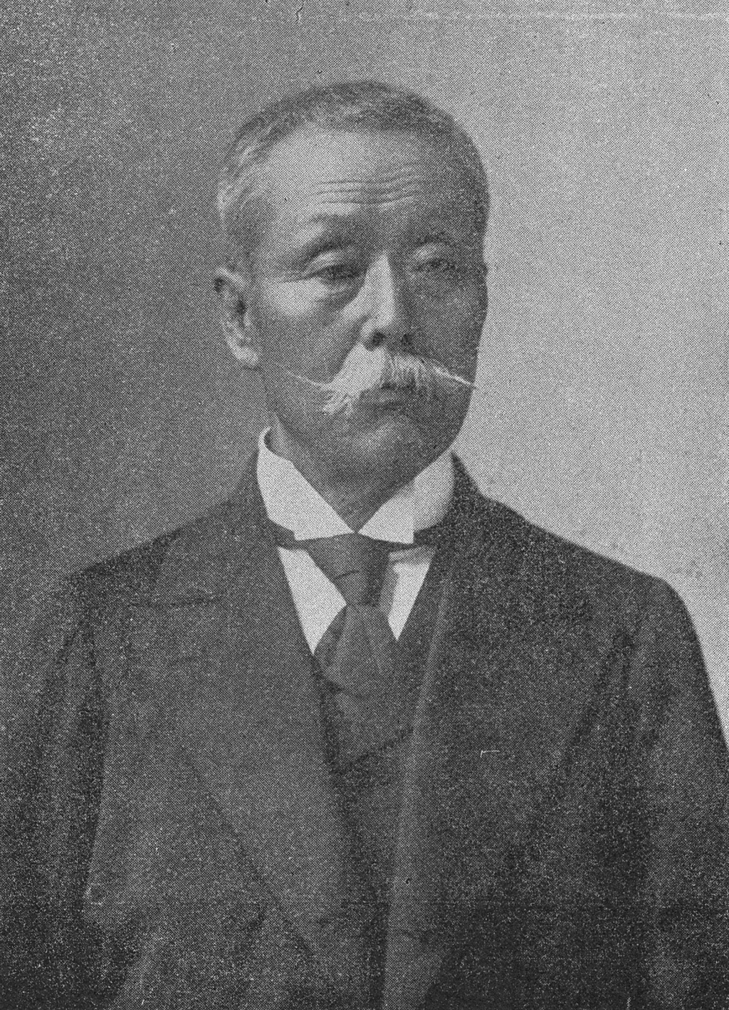 Portrait of Tamaki Han'emon (玉置半右衛門, 1838 – 1910)